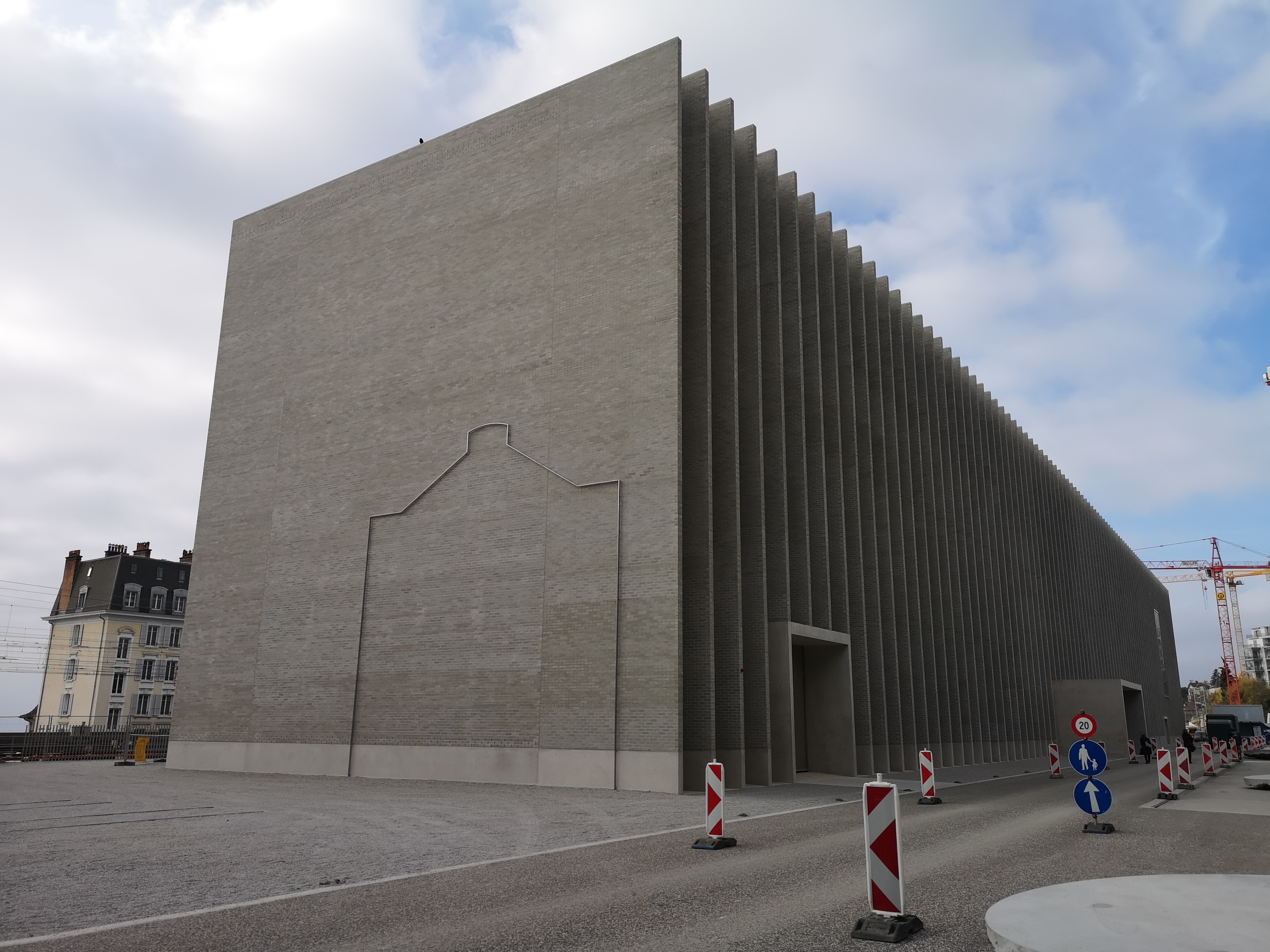 Le nouveau bâtiment du Musée cantonal des Beaux-Arts à Lausanne.